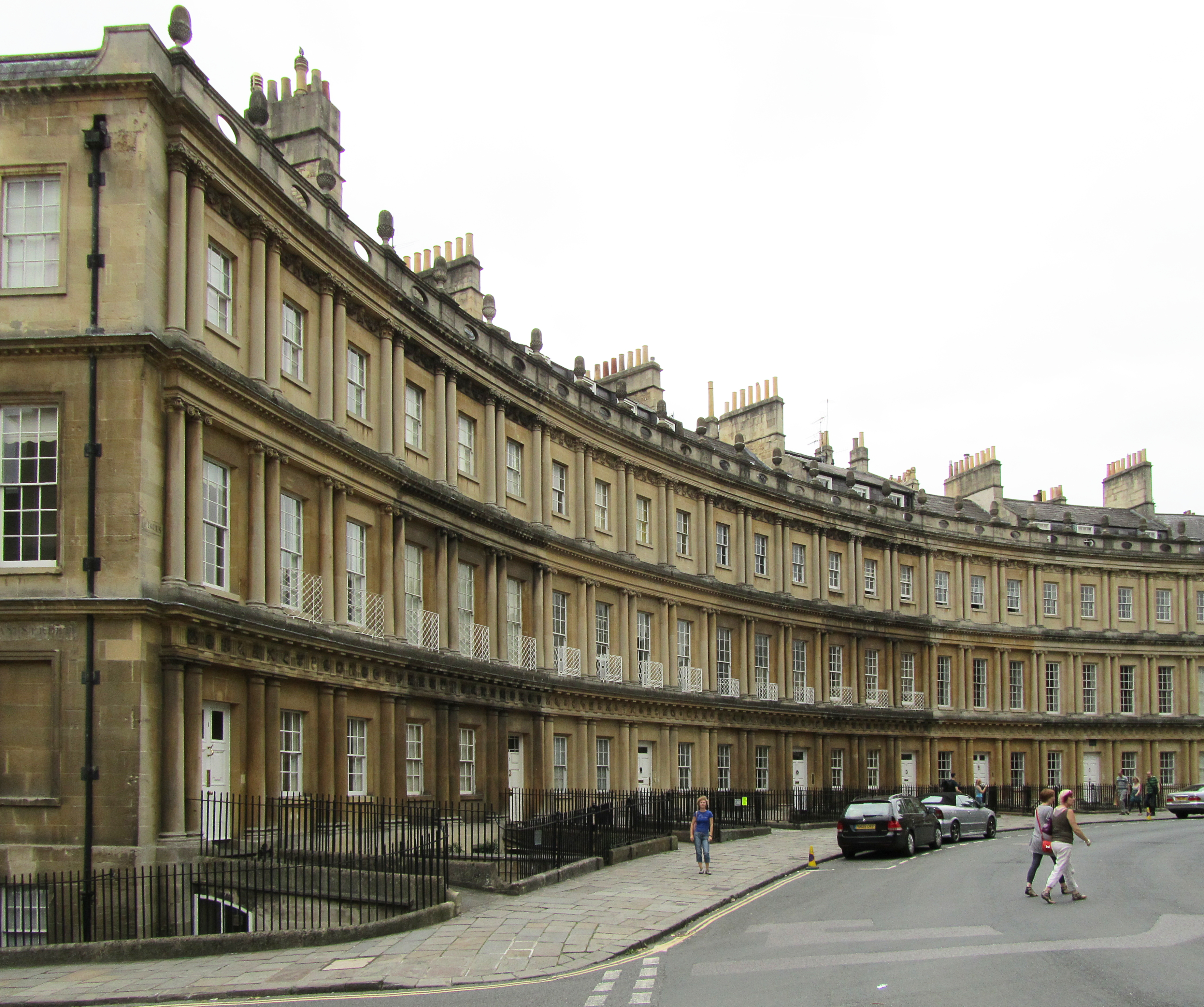 Bath, Somerset